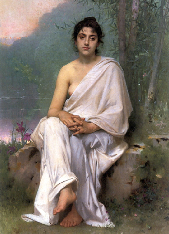 Méditation